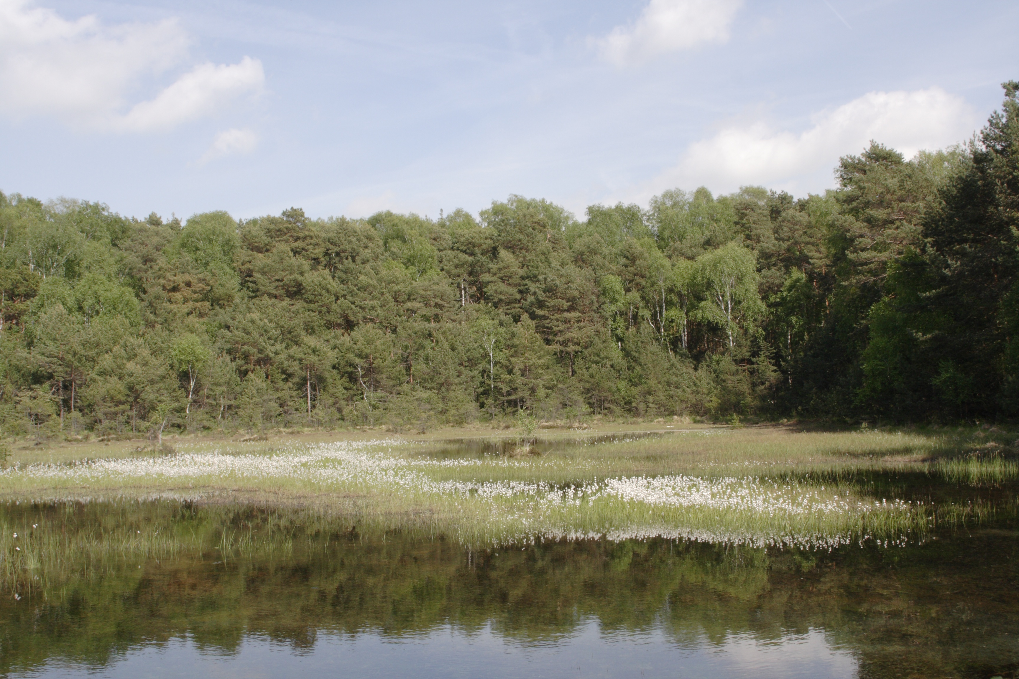 Dübener Heide - Zadlitzbruch - L 44